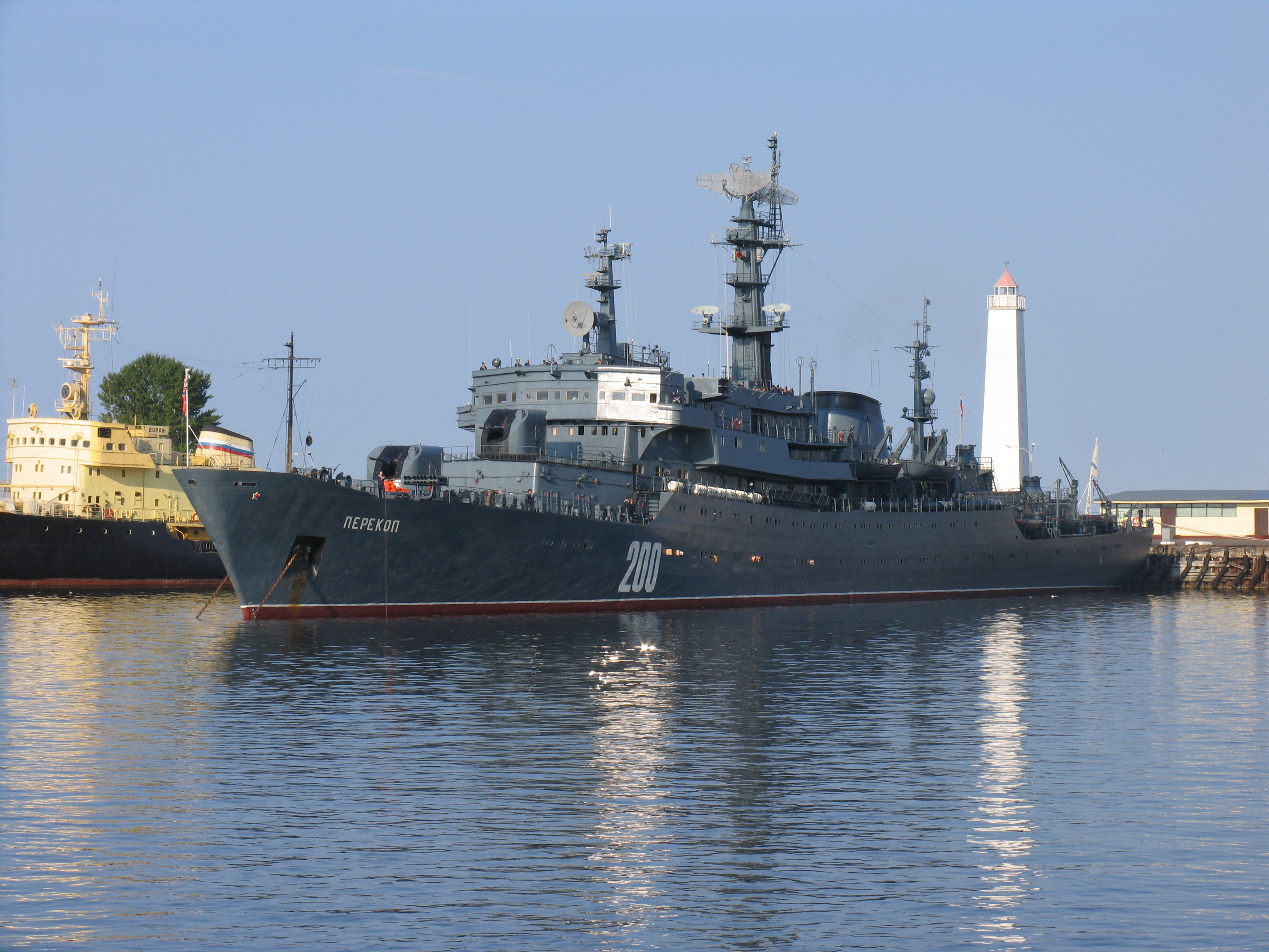 Учебный корабль "Перекоп". Кронштадт.